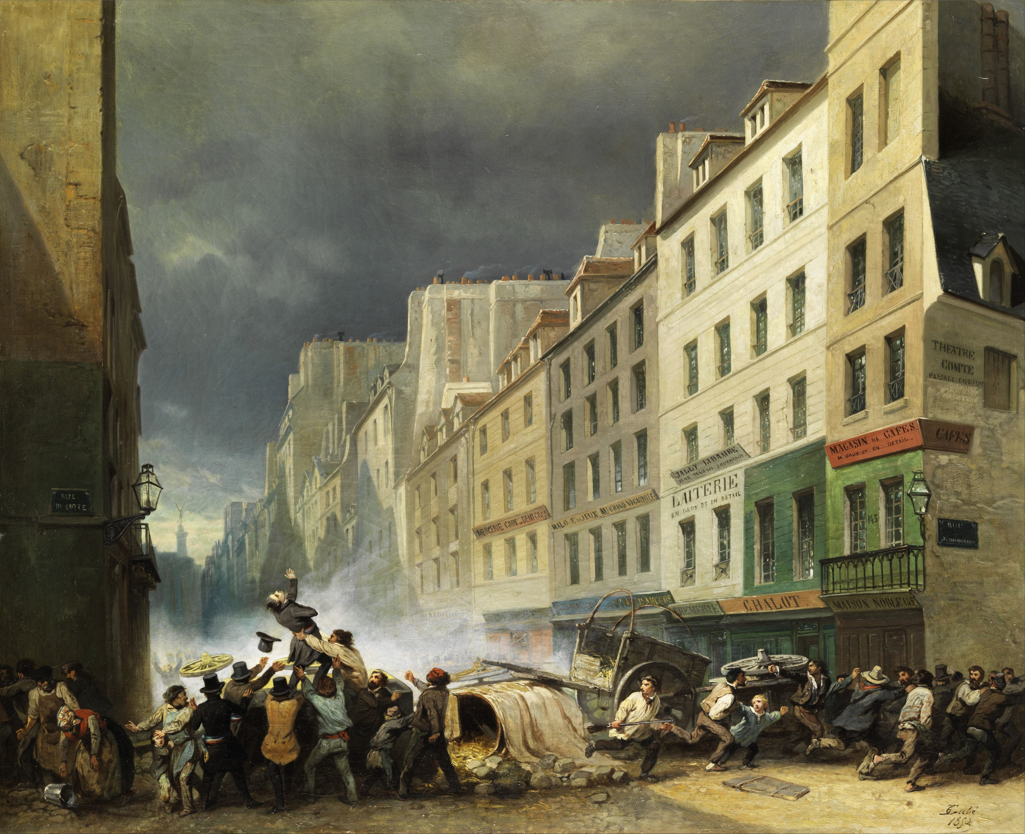 Juli-Revolution 1830 in Paris, Öl auf Leinwand, 80 x 100 cm